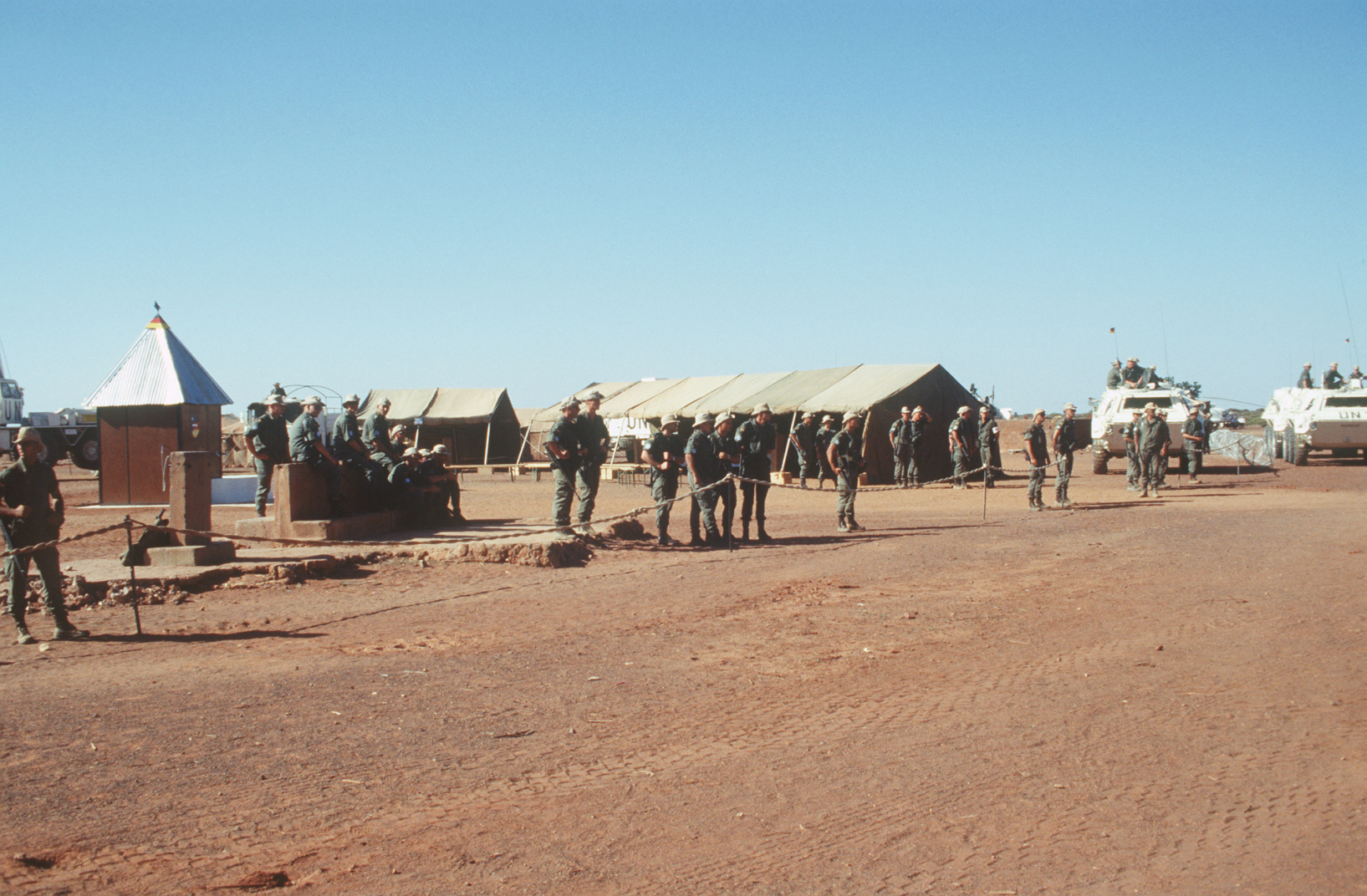 Der Deutsche Soldaten in Matabaan nahe Beledweyne, Somalia 1993. Originaltext: The German Army prepares for a well dedication ceremony; their 2nd Contingent dug the well during UNOSOM II. German Defense Minister Voelker Ruehe was on hand to dedicate the well.